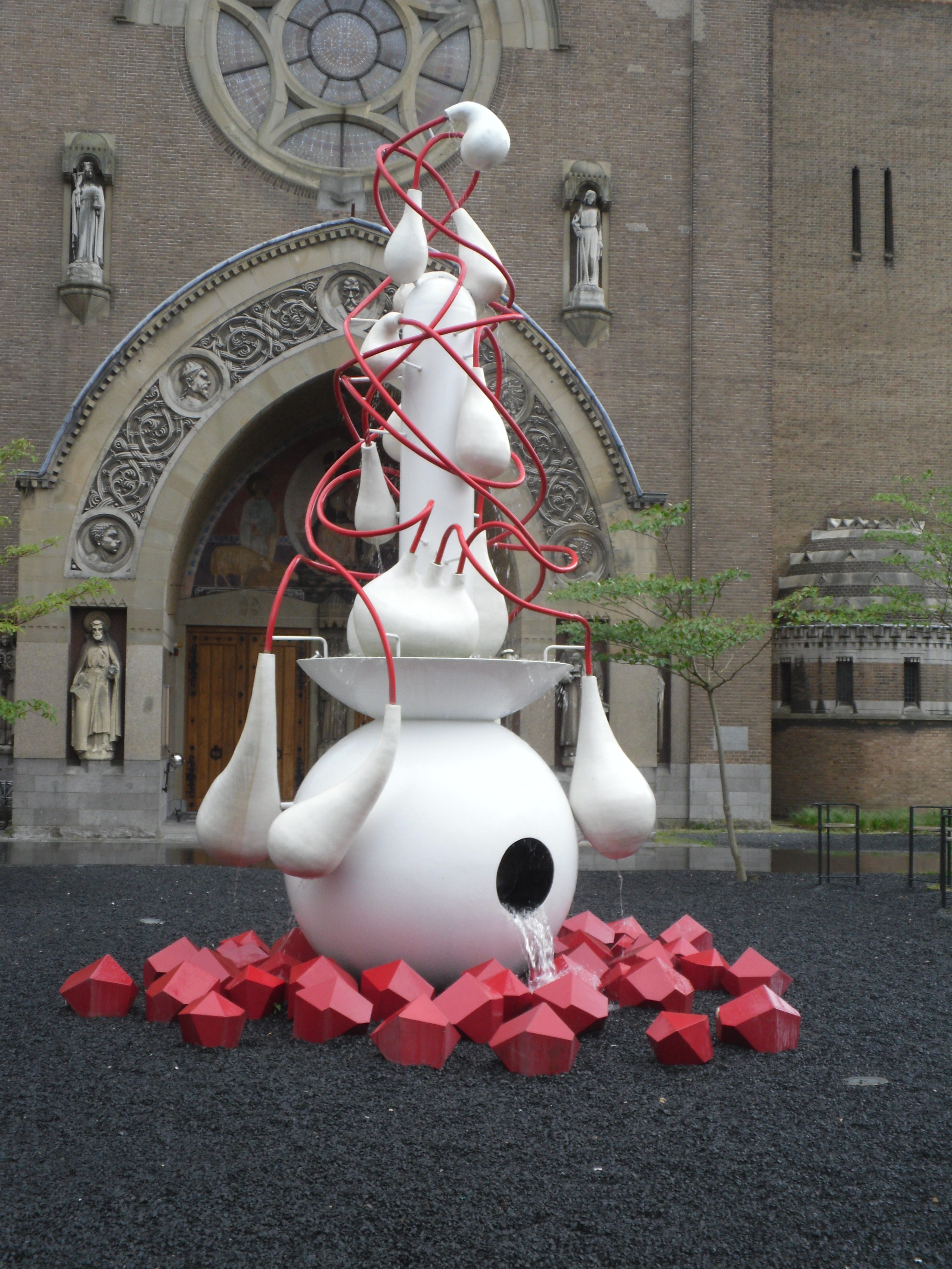 Jeroen Boschplein, 's-Hertogenbosch (bij de Hinthamerstraat). Fontein in de vorm van een constructie uit een schilderij van Jeroen Bosch